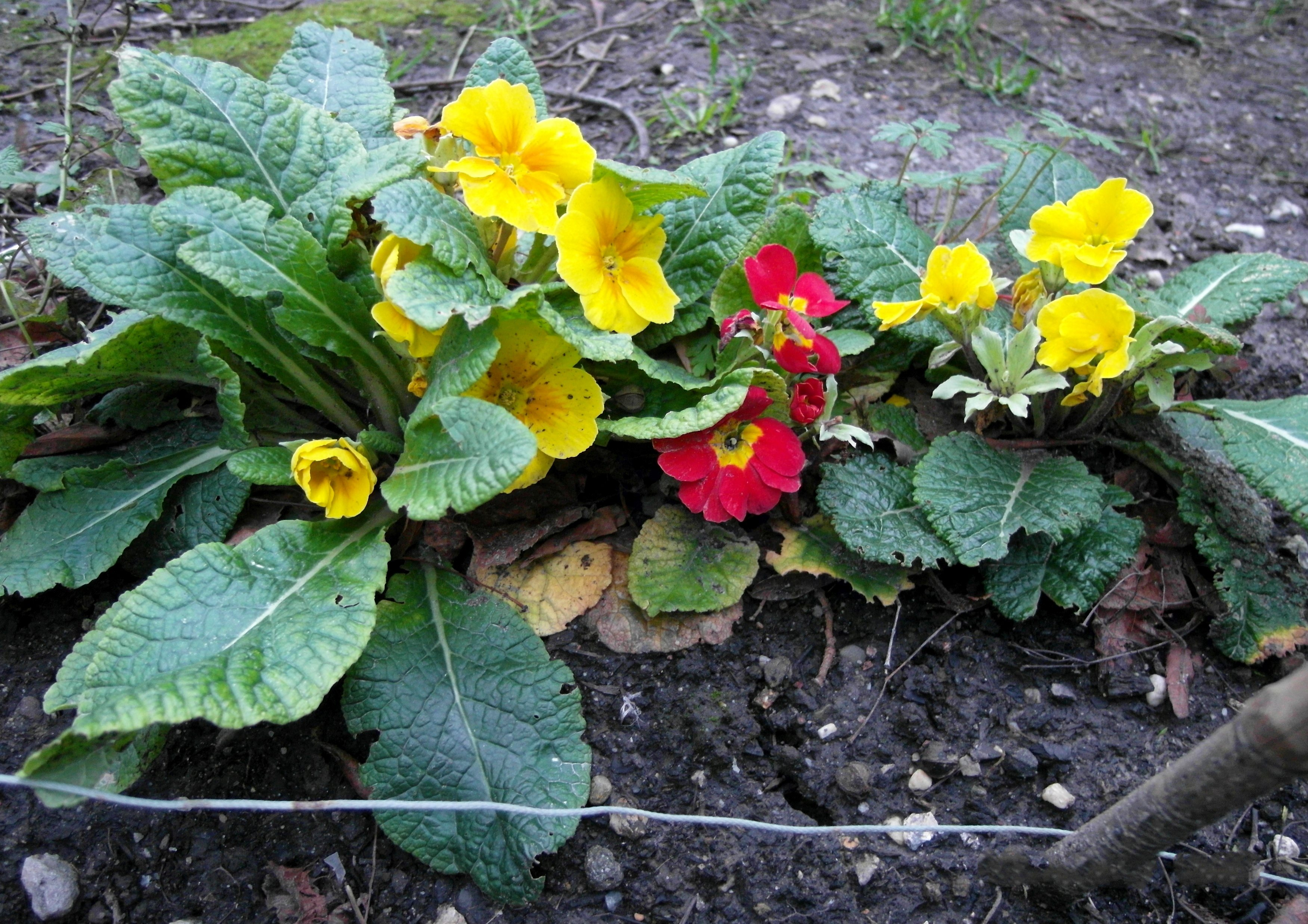 Am 31. Dezember noch blühende Freiland-Primel im Stadtgebiet von Aachen